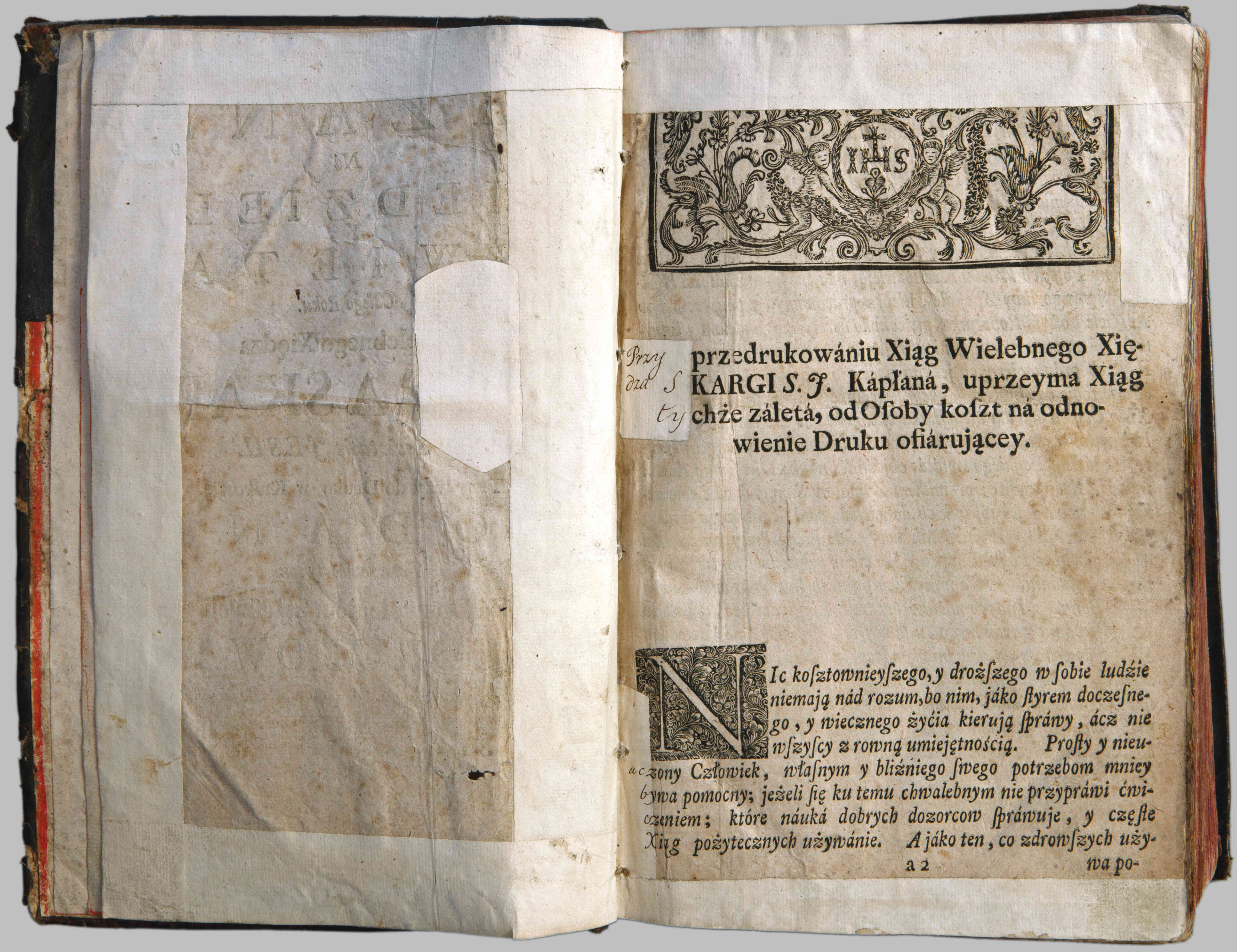 Kazania na niedziele y swięta całego roku Скарга Пётр, 1735 г. Папера, друк; 31 см; Нацыянальная бібліятэка Беларусі